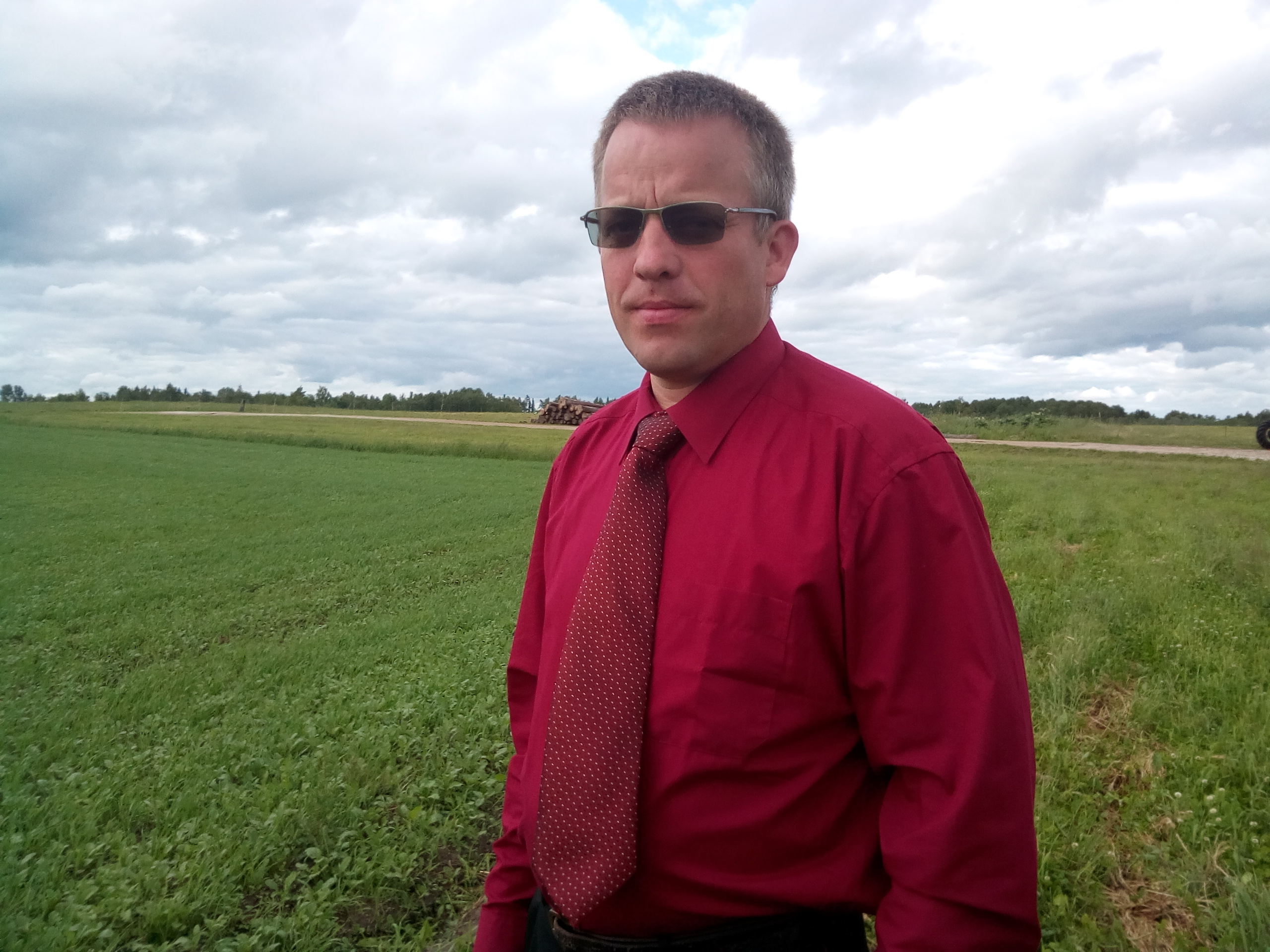 Avaldatud Postimehes artikli autori fotona